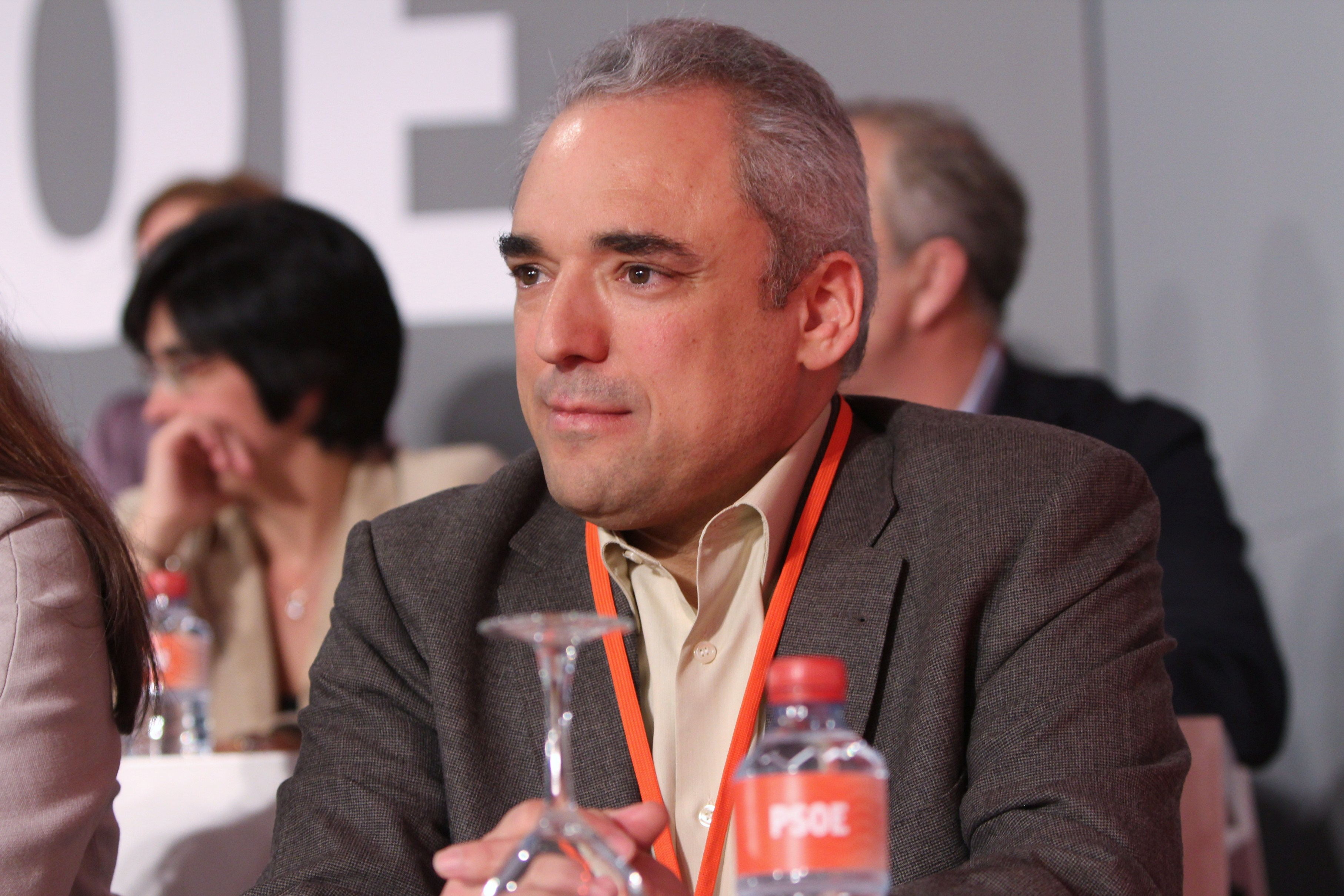 Rafael Simancas en la clausura 38 Congreso del PSOE